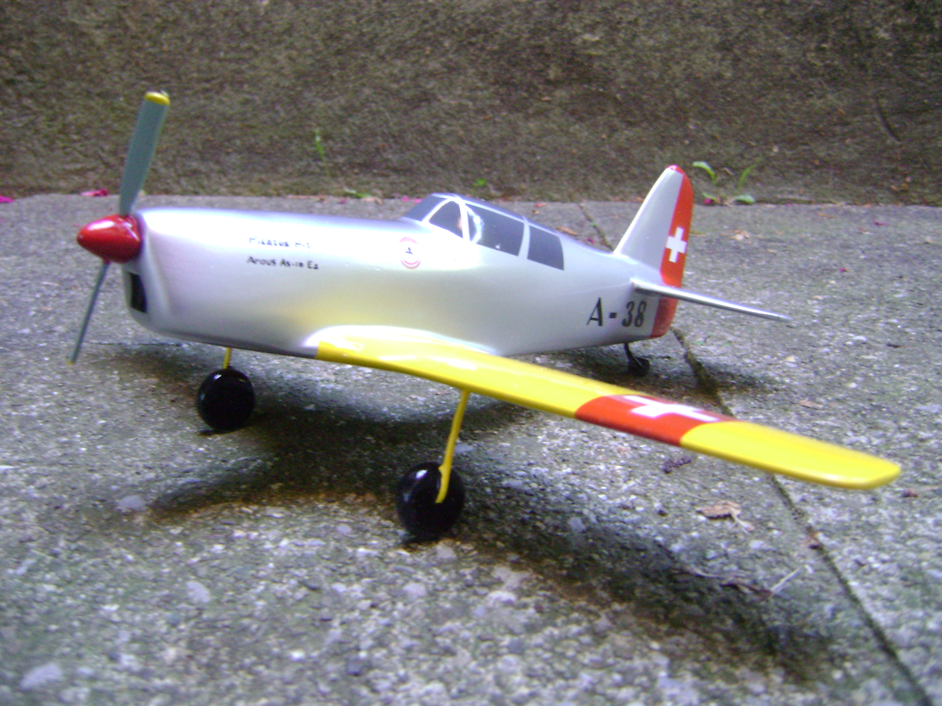 Pilatus P-1 1sitziges Trainingsflugzeug Projekt